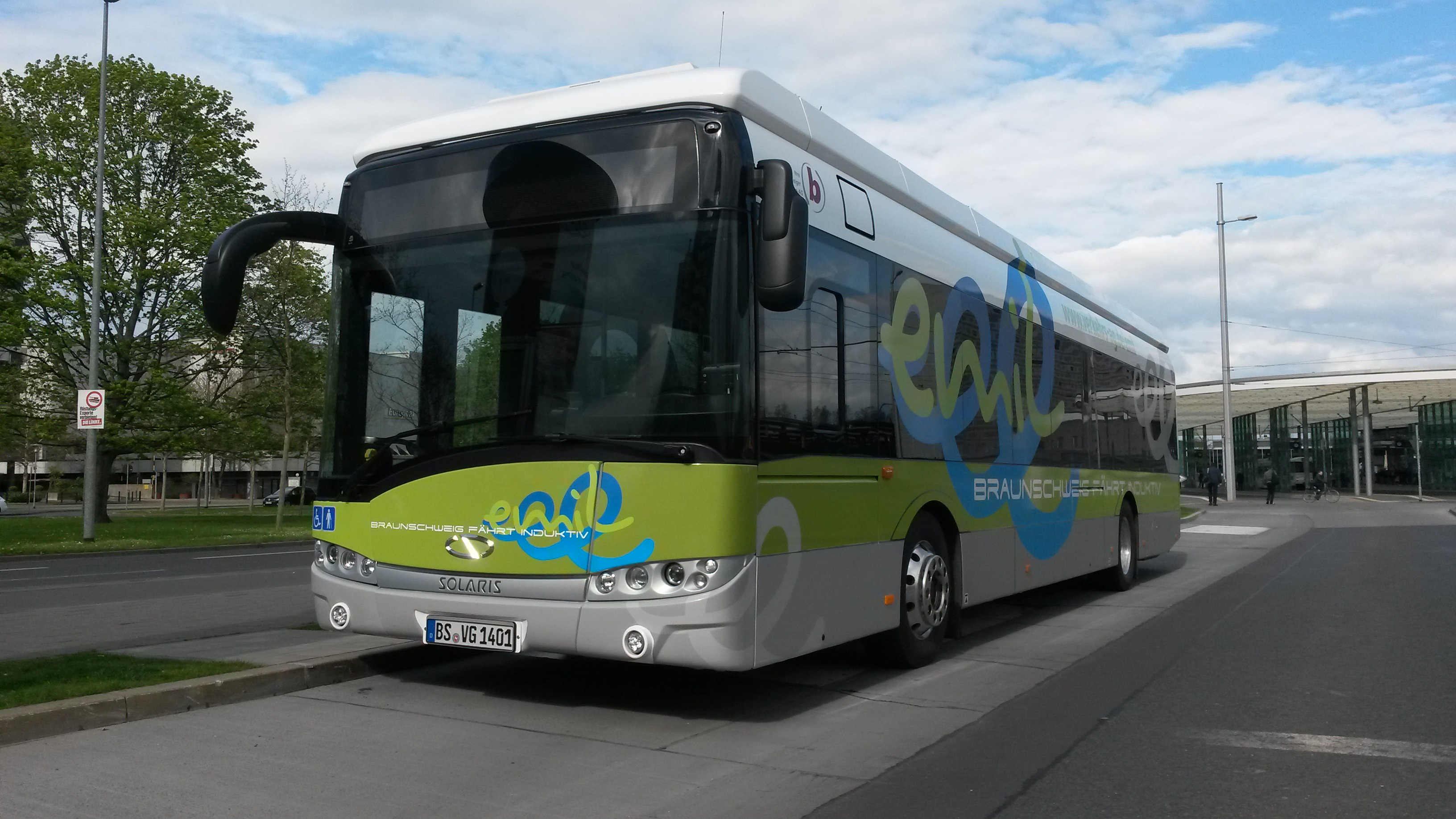 Der im Zuge des Förderprogramms "EMIL" angeschaffte Wagen 1401 der Braunschweiger Verkehrs-AG, ein Batteriebus vom Typ Solaris Urbino 12 electric. Die Aufladung der Fahrzeugbatterie durch das Primove-System der Firma Bombarider erfolgt mittels elektromagnetischer Induktion an einzelnen Haltestellen, wie hier in der Betriebshaltestelle am Hauptbahnhof (weiße Ladeplatte unter dem Fahrzeug).